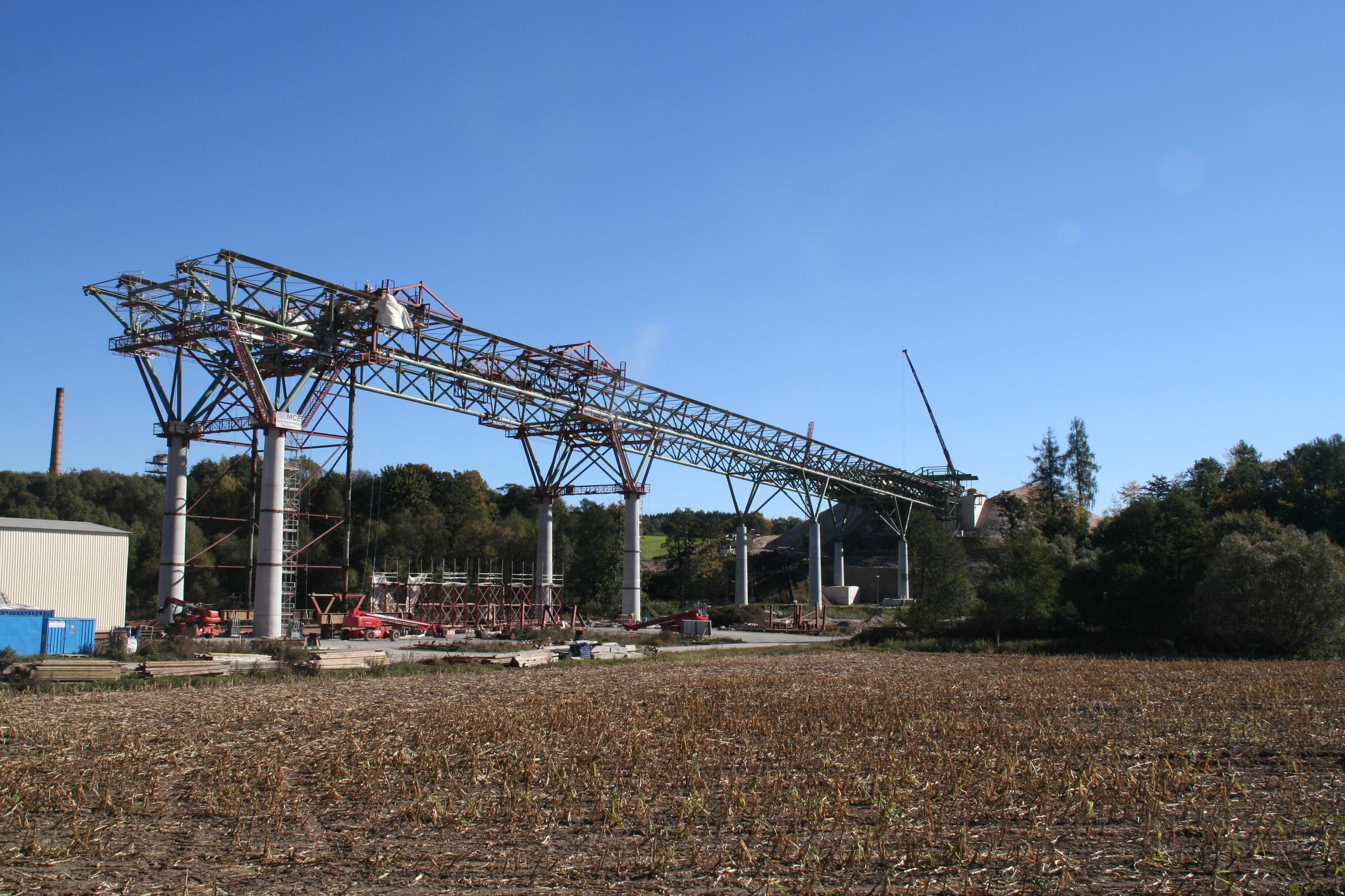 Talbrücke St. Kilian Brücke der A73 bei Schleusingen über die B247